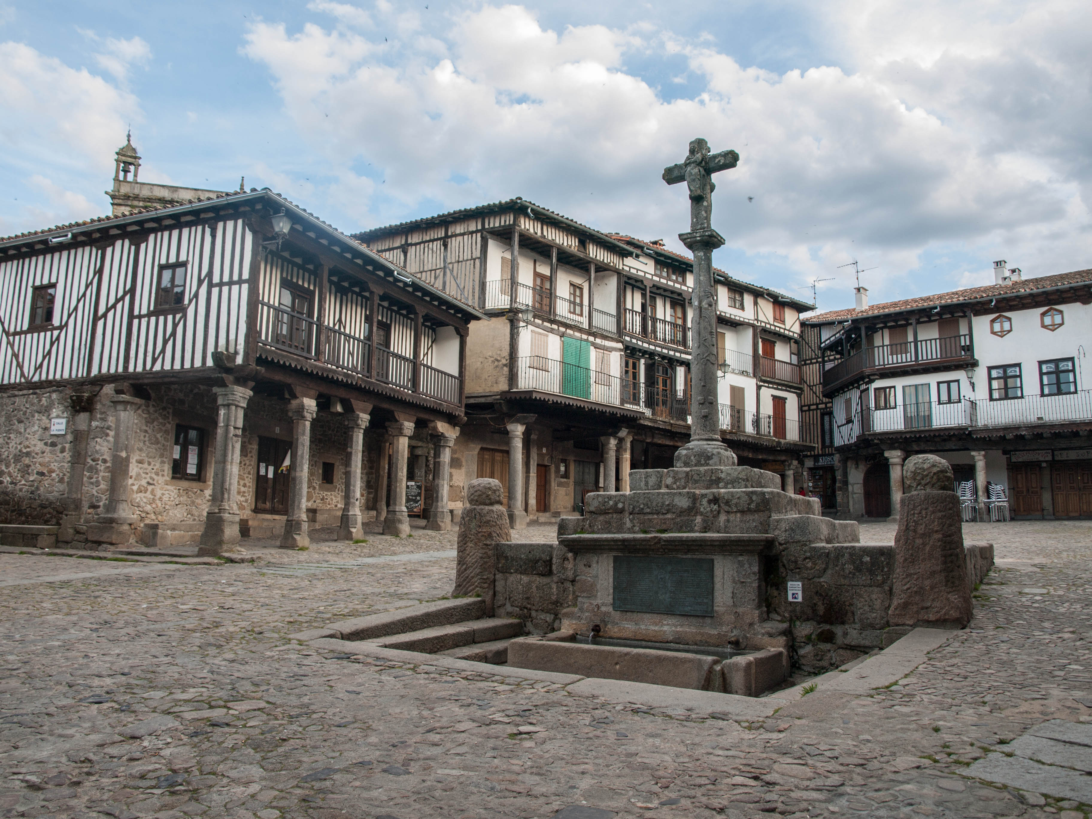 La Alberca's main square